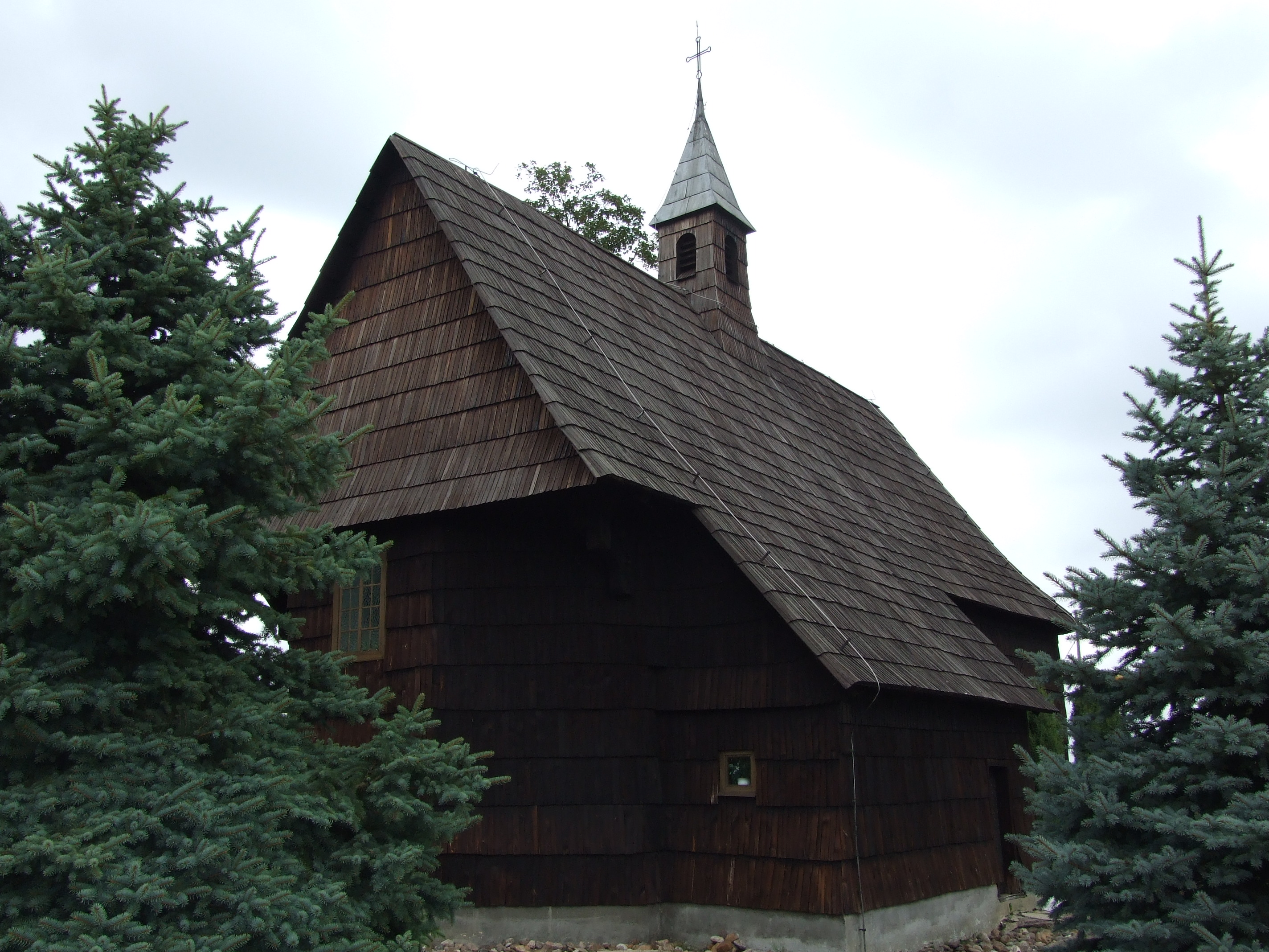 Kościół św. Antoniego z Padwy w Sowczycach